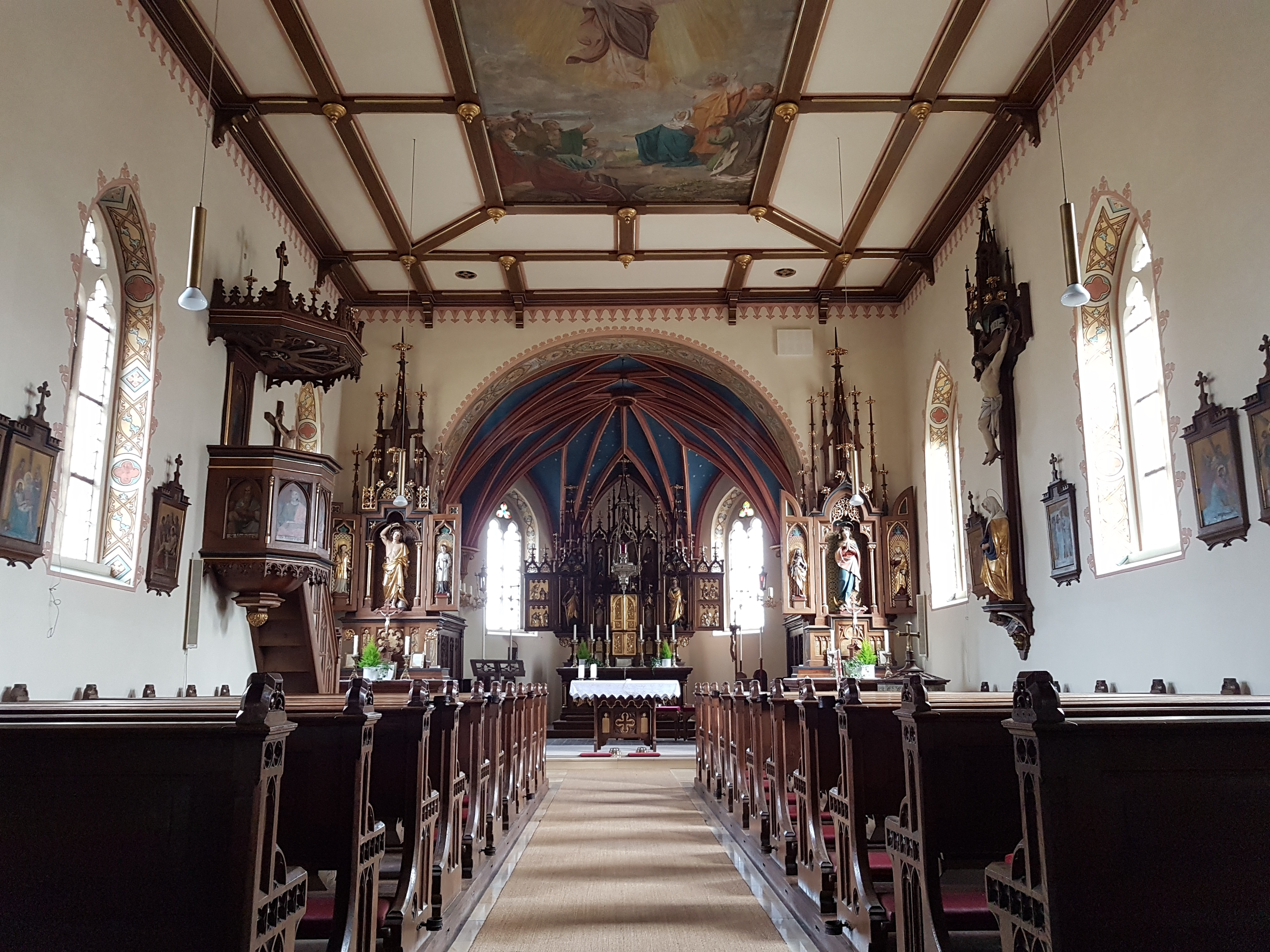 St. Margareth (Malching), Innenraum mit Blick zum Chor.